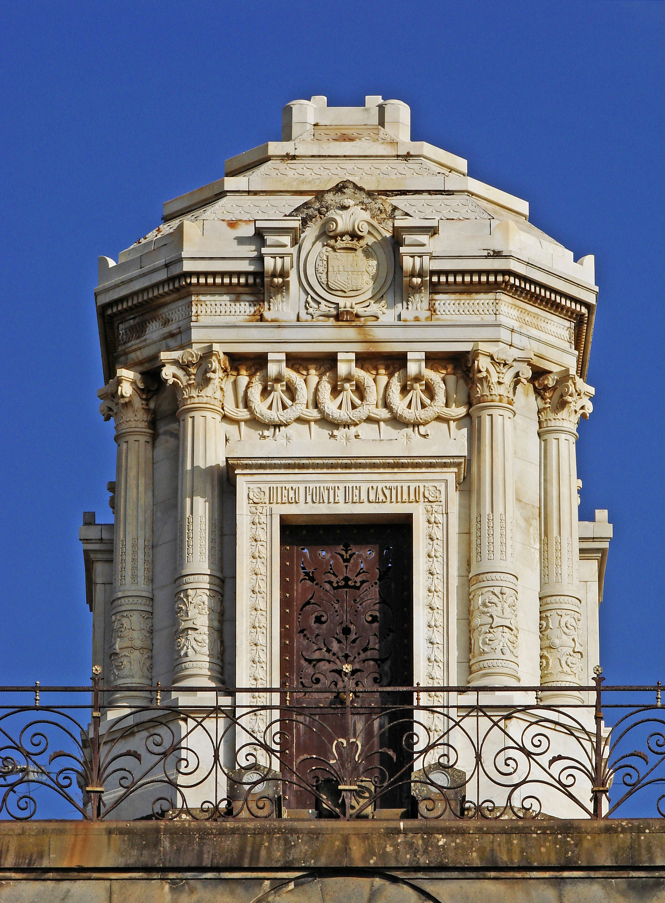 Mausoleum, Jardines del Marquesado de la Quinta Roja, La Orotava